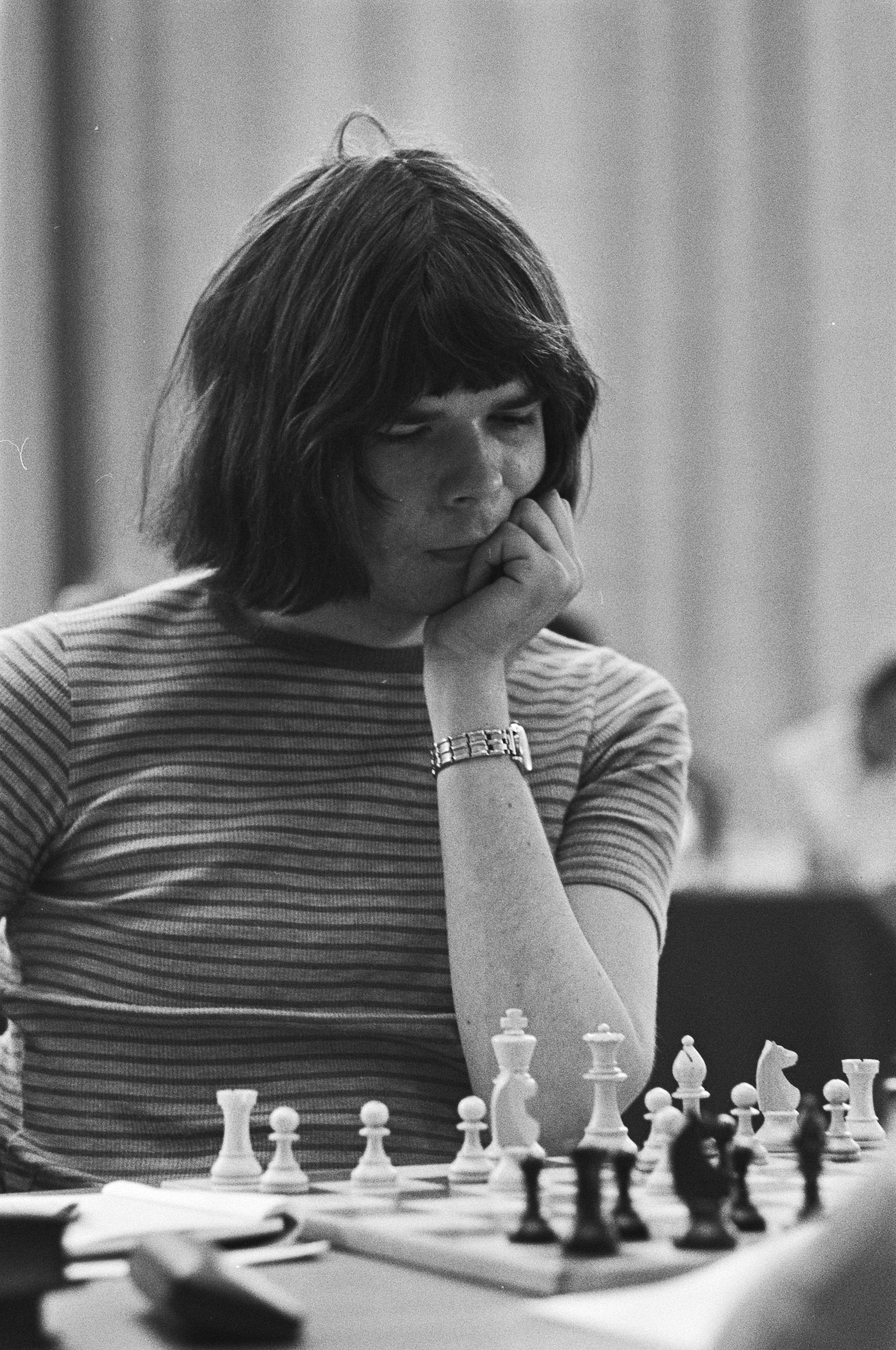 Collectie / Archief : Fotocollectie Anefo Reportage / Serie : [ onbekend ] Beschrijving : IBM-schaaktoernooi in Amsterdam, Ligterink in aktie Datum : 8 juli 1976 Locatie : Amsterdam, Noord-Holland Trefwoorden : schaken Instellingsnaam : IBM-Schaaktoernooi Fotograaf : Bogaerts, Rob / Anefo Auteursrechthebbende : Nationaal Archief Materiaalsoort : Negatief (zwart/wit) Nummer archiefinventaris : bekijk toegang 2.24.01.05 Bestanddeelnummer : 928-6831